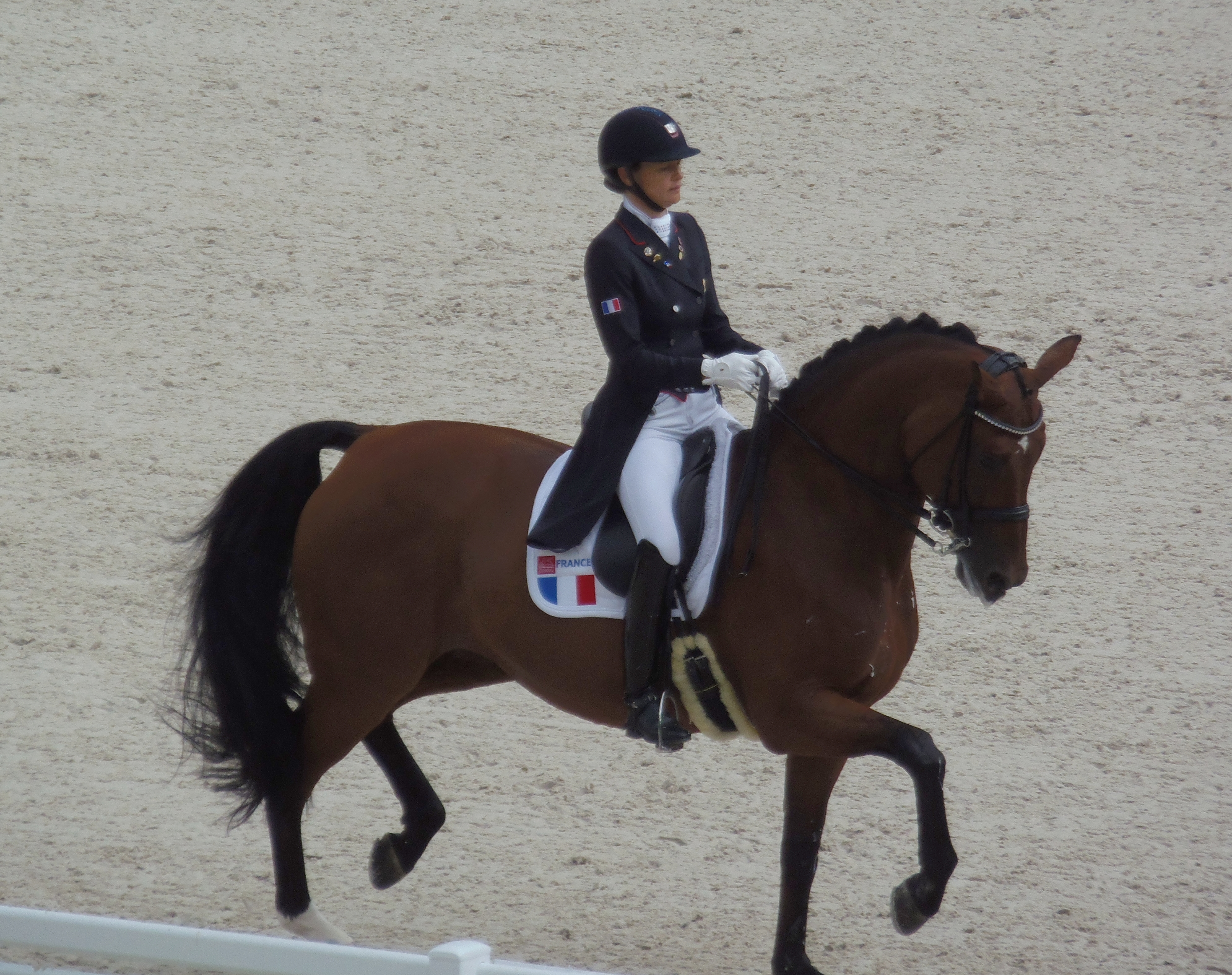 Jessica Michel en selle sur Riwera de Hus lors des Jeux équestres mondiaux, le 26 août 2014 au stade d'Ornano à Caen (Normandie, France).